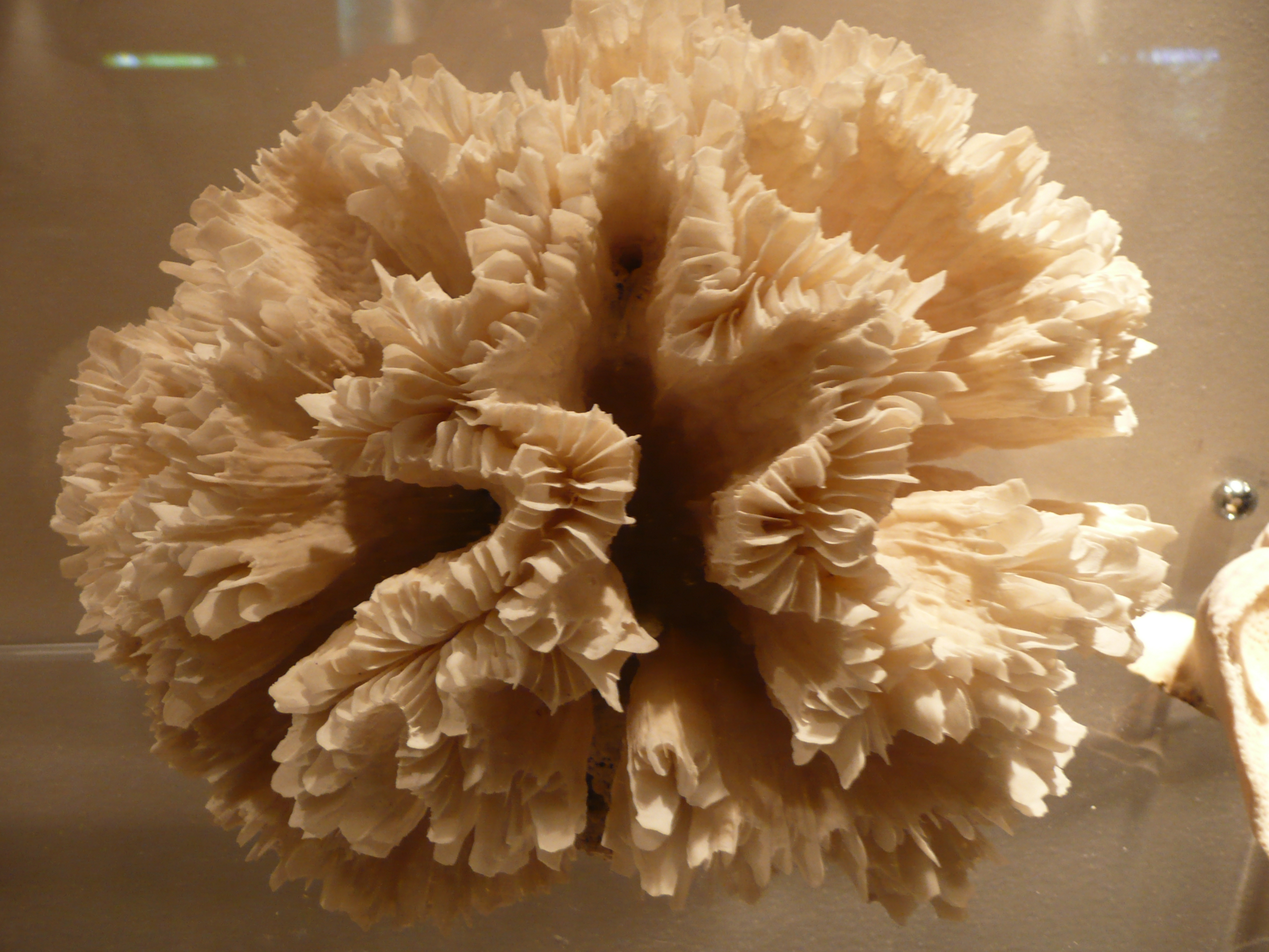 Plerogyra sp. in Aquarium tropical du Palais de la Porte Dorée